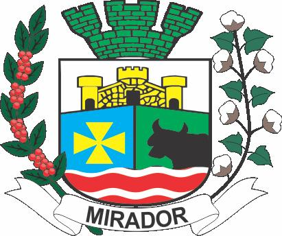 Brasão